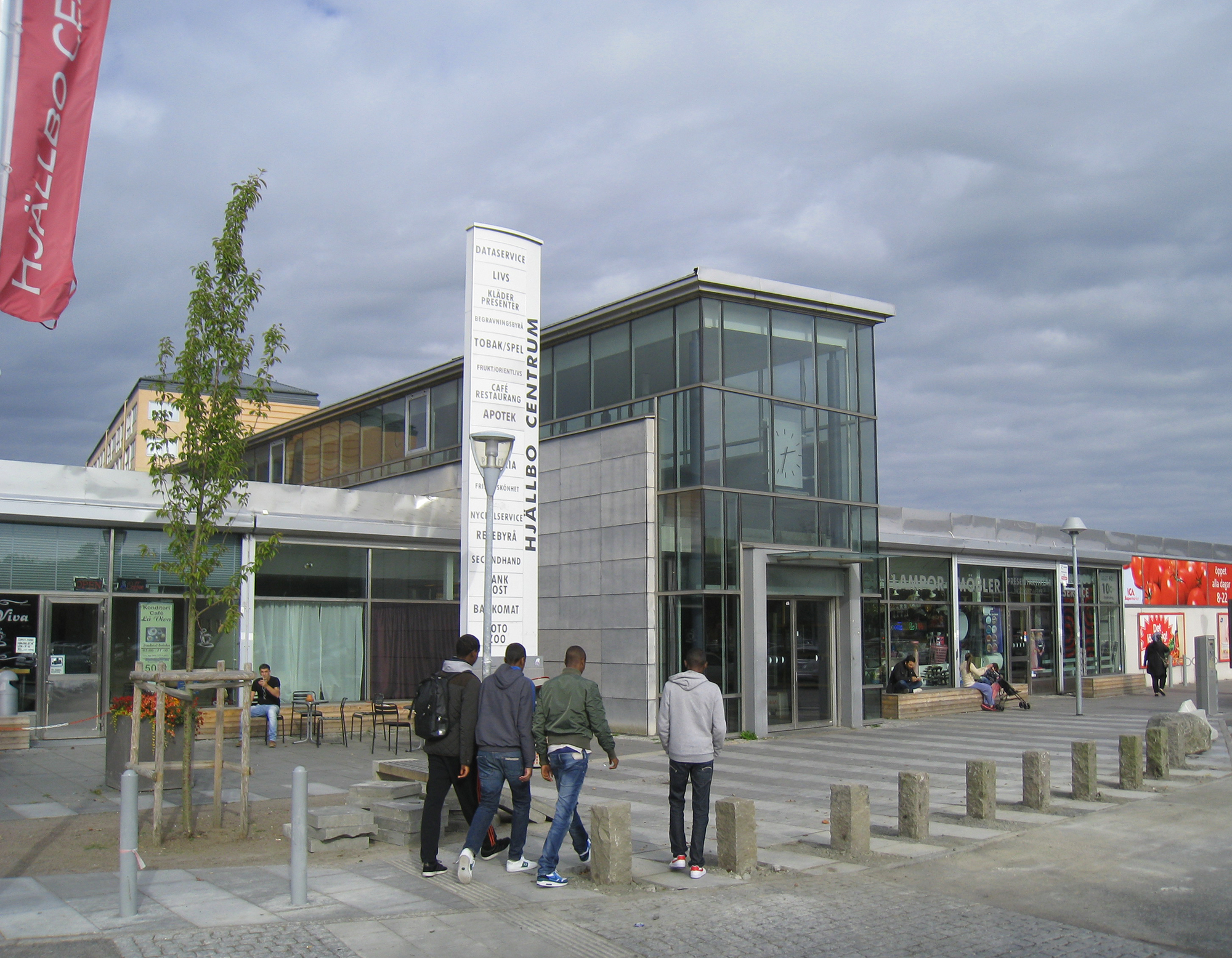 Hjällbo Centrum. Shopping mall. Göteborg